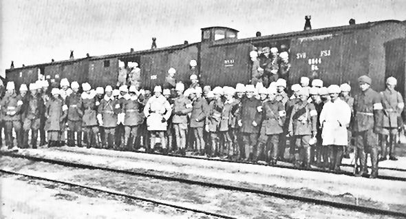 Oulun toinen vapaaehtoinen komennuskunta matkalla etelään.